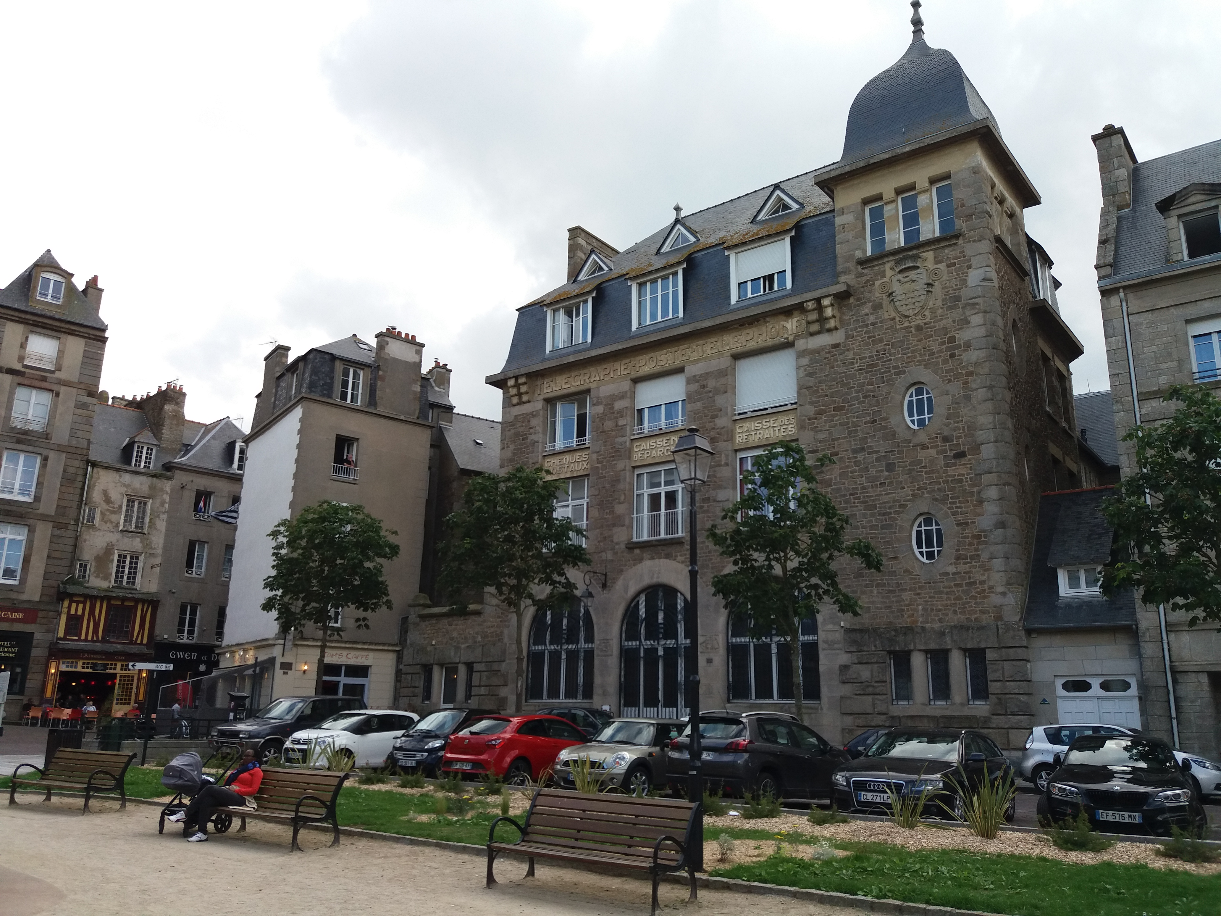 Place des Frères Lamennais, Saint-Malo (Ille-et-Vilaine, France)